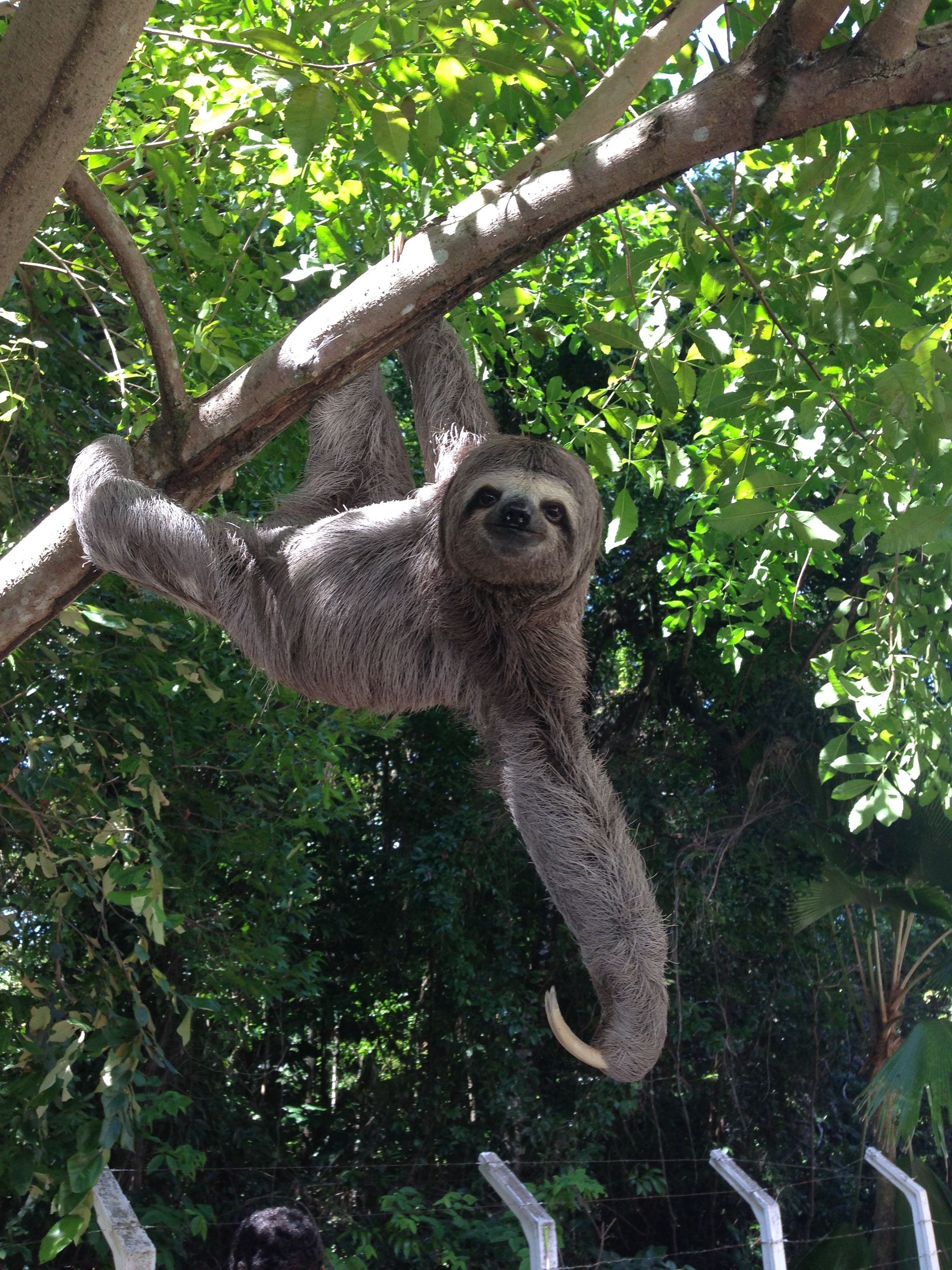 Imagem de bicho-preguiça retirada na UFPB